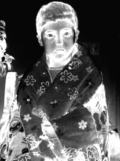 سولاريزه